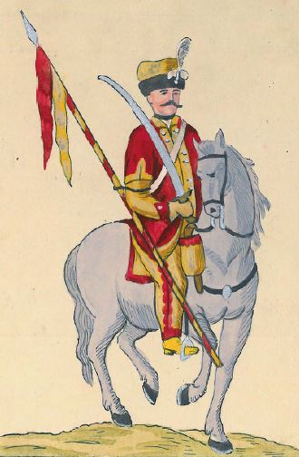 75. Ułan na koniu z Wojsk Nadwornych Koronnych (ułan nadwornego pułku królewskiego (późniejszy pułk 6 przedniej strazy płk. Jakuba Azulewicza)